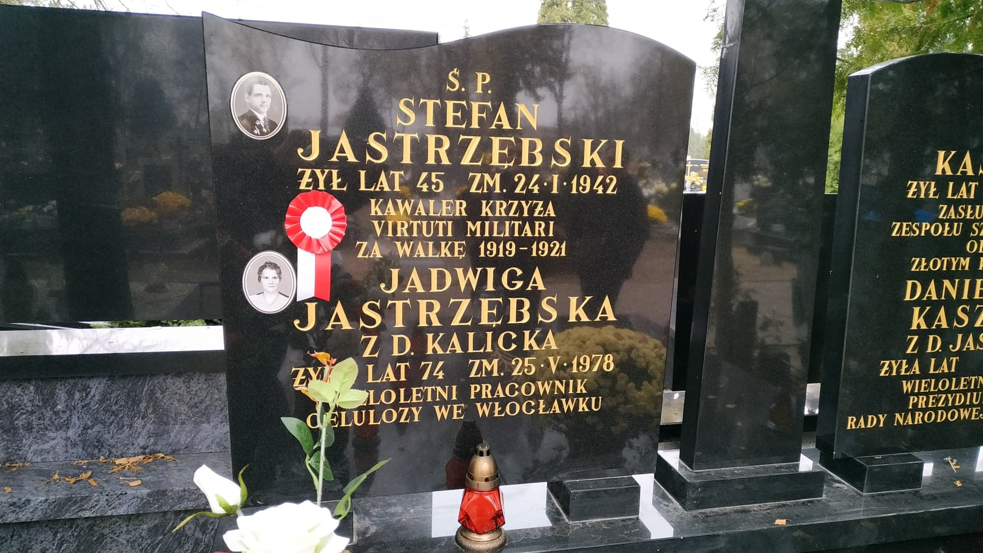 Grób Stefana Jastrzębskiego na włocławskim cmentarzu.